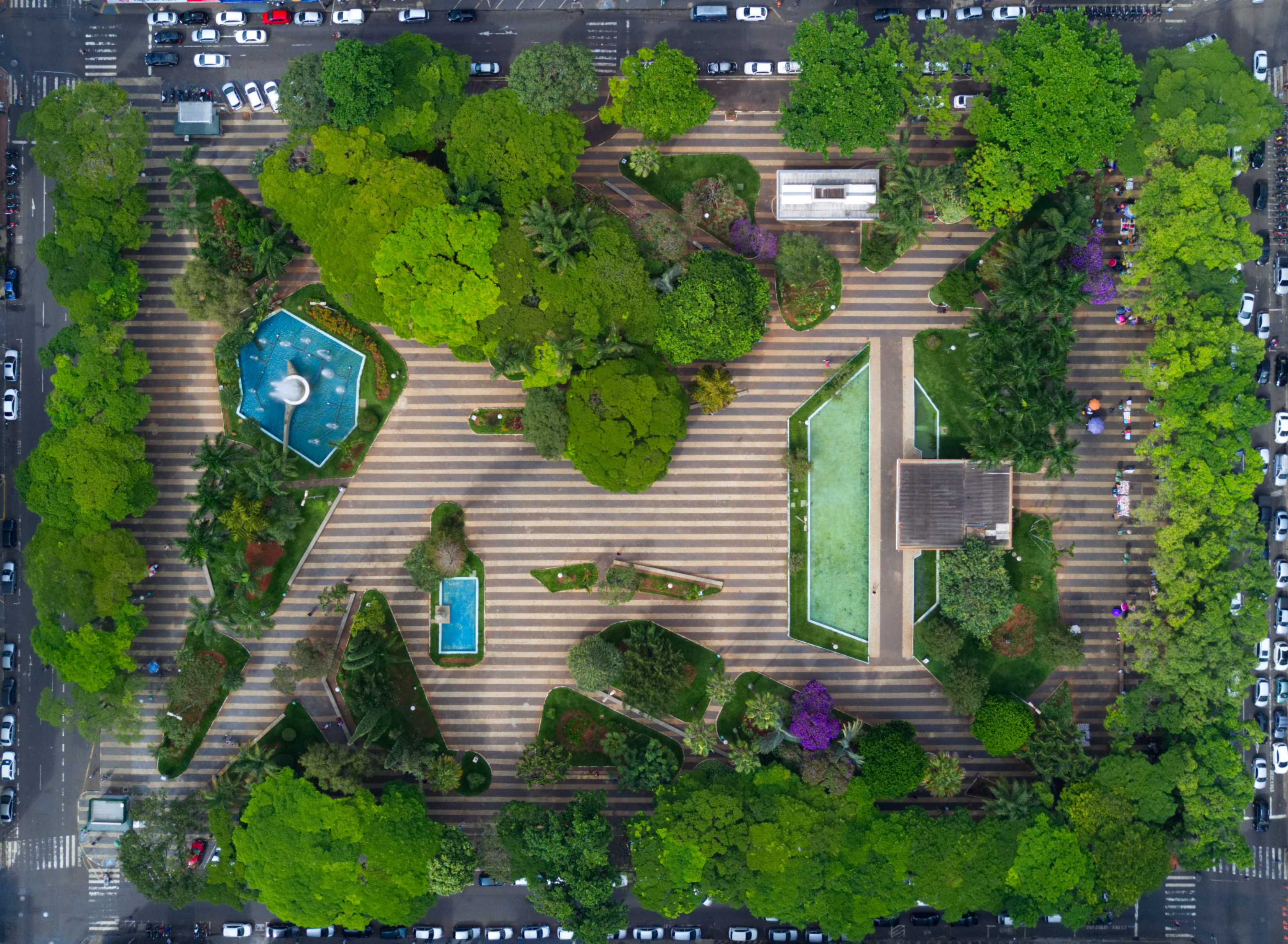 Vista aérea da praça